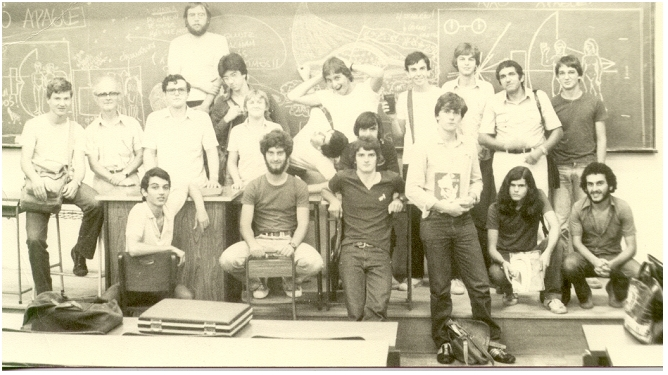 Grupo de estudantes e professores integrantes da Sociedade Astronômica Riograndense (SARG), de Porto Alegre, RS, Brasil, durante o a realização de seu 1o. Curso de Exobiologia em 18/12/1981.